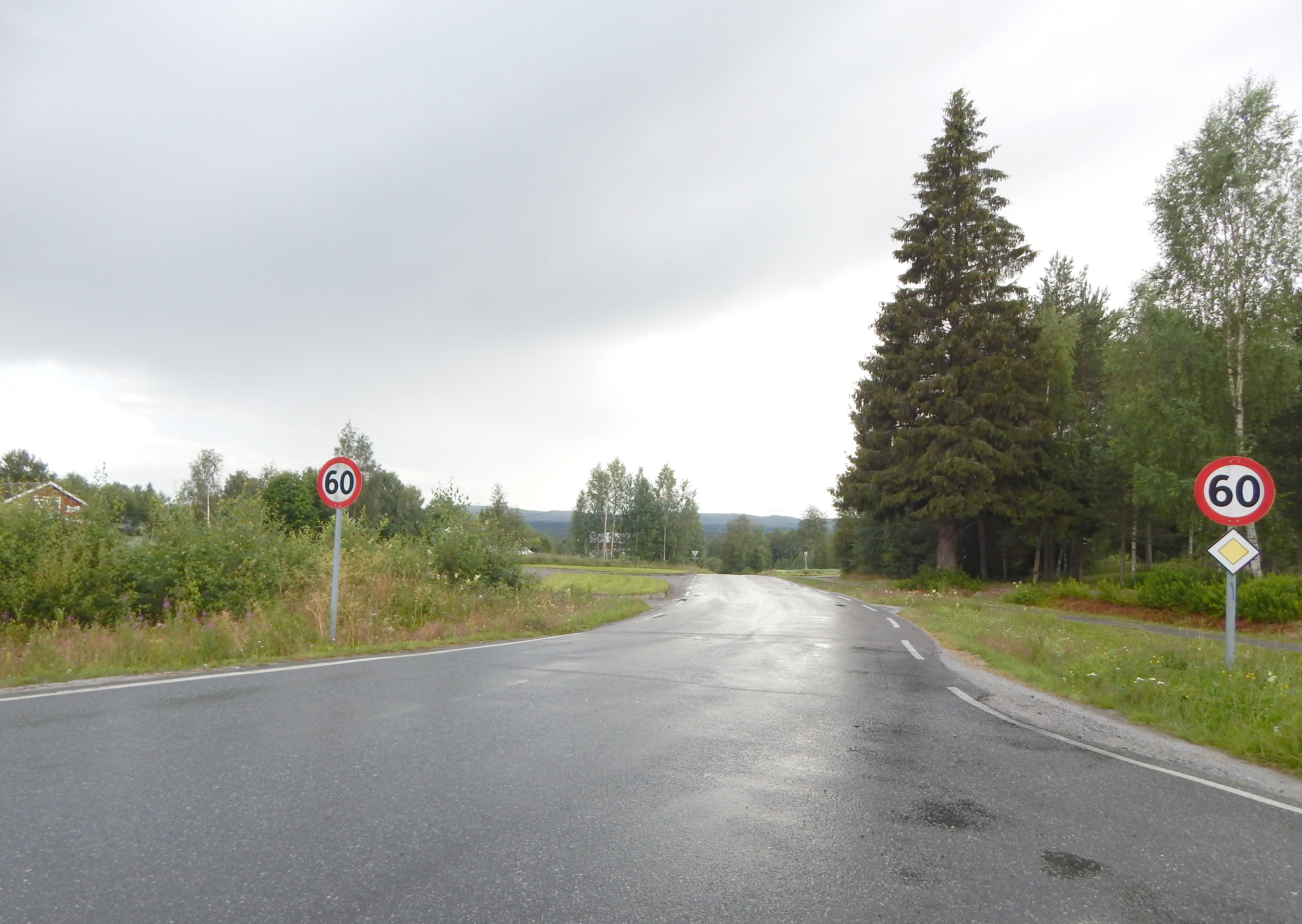 Løkkervegen (fylkesvei 1926, tidl. 261) ved Åbråten